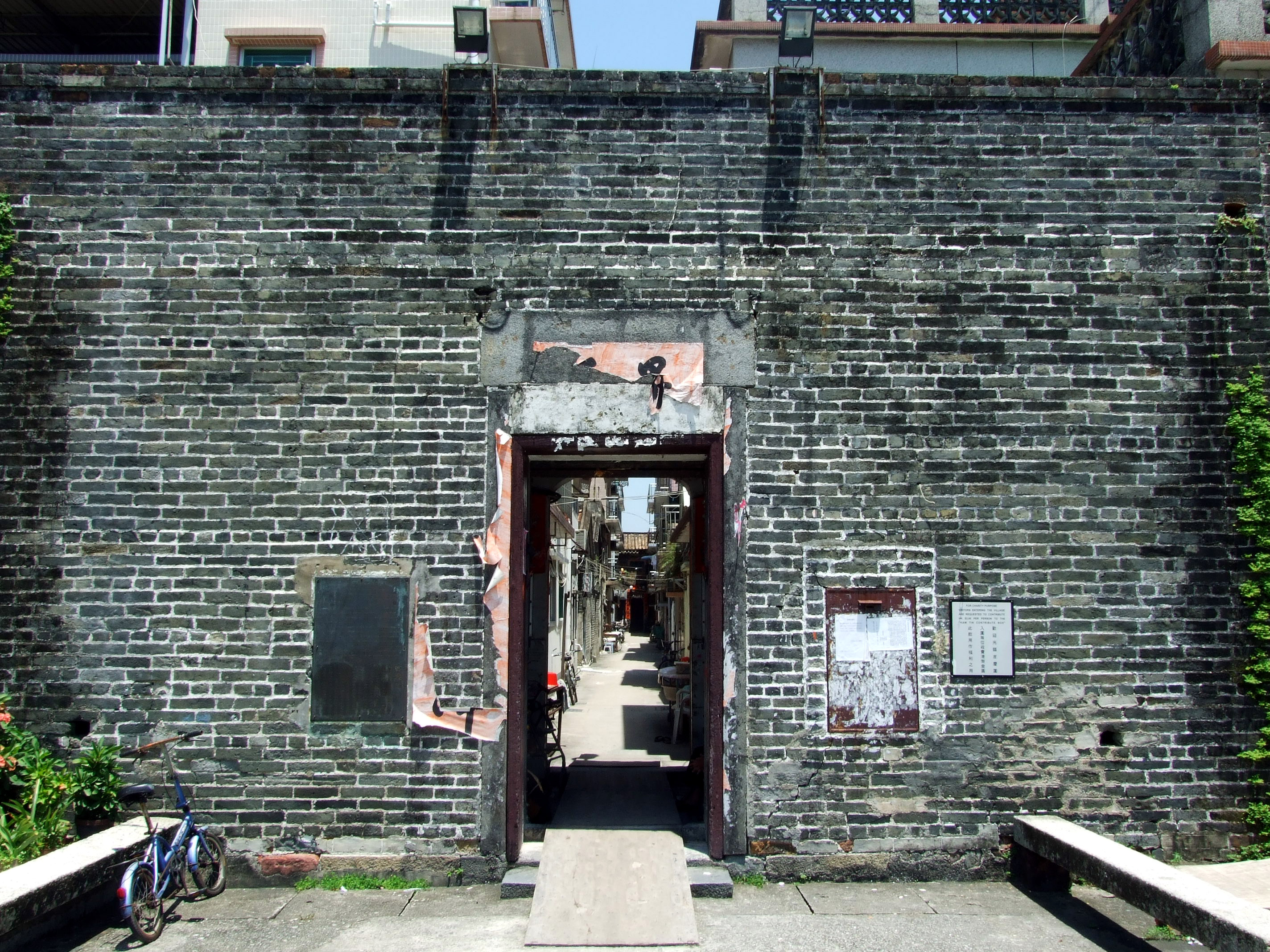 中文（香港）: 吉慶圍圍門